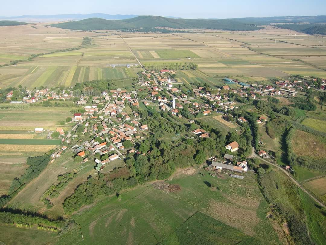 Biserica Ortodoxă cu hramul Sfântul Mucenic Dimitrie-Izvorâtorul de Mir, Dobolii de Jos, județul Covasna